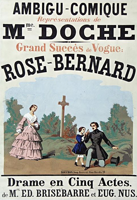 Ambigu-Comique... Mme Doche [dans] Rose Bernard. Drame en cinq actes.